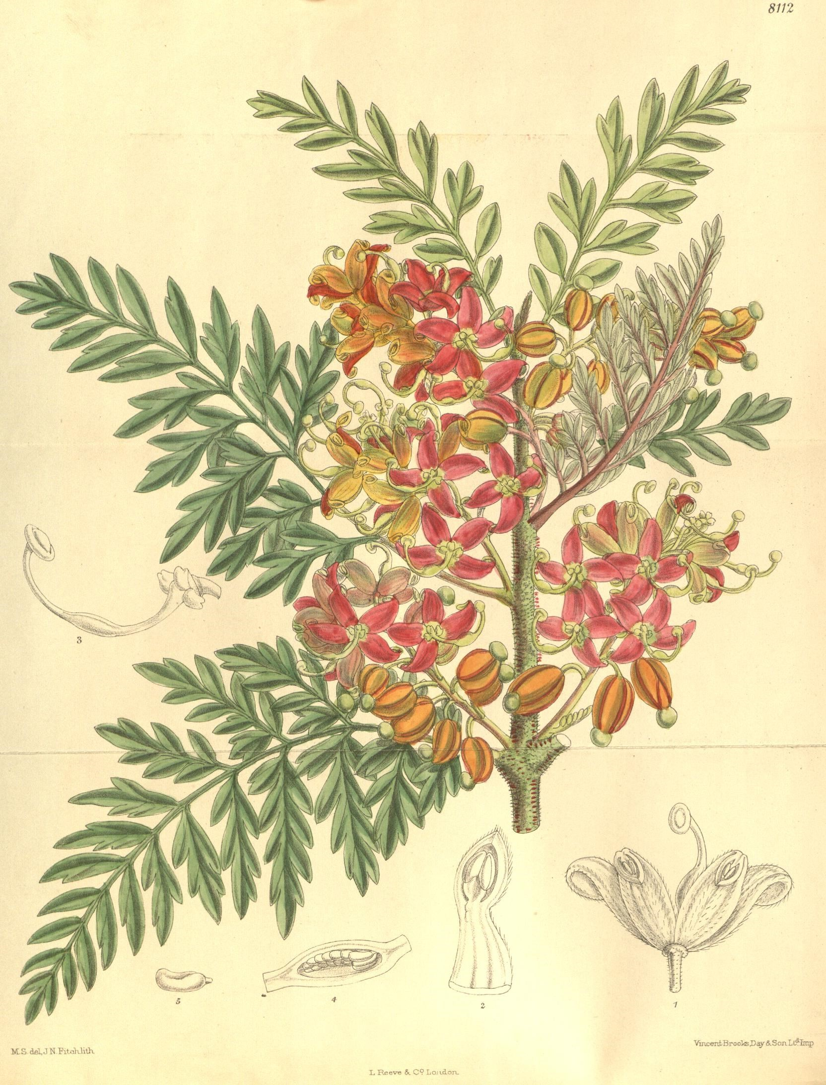 Lomatia ferruginea